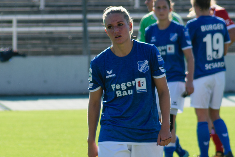 Selina Wagner